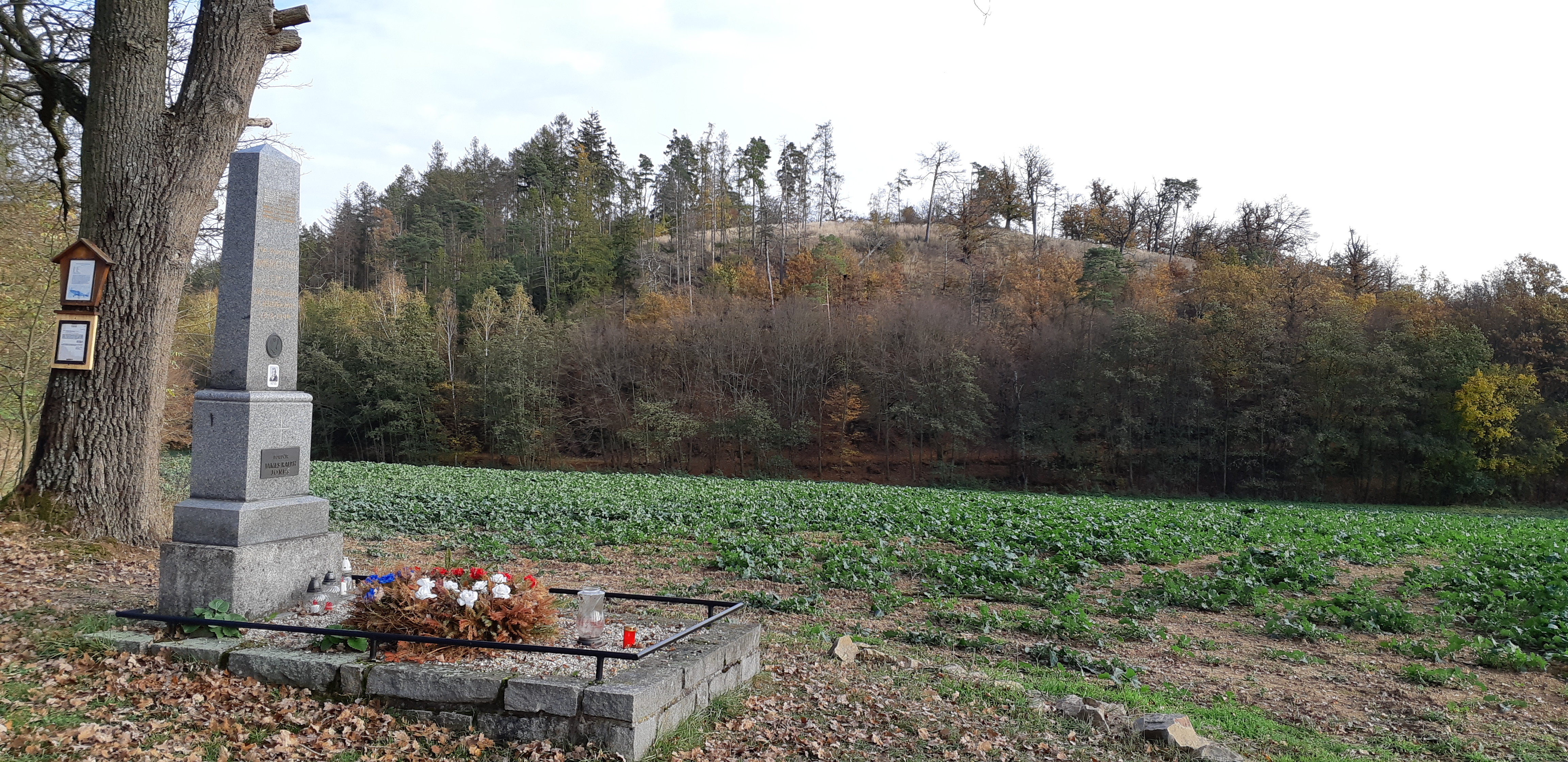 Pohled na místo havárie (na poli za pomníkem blíže k lesu).